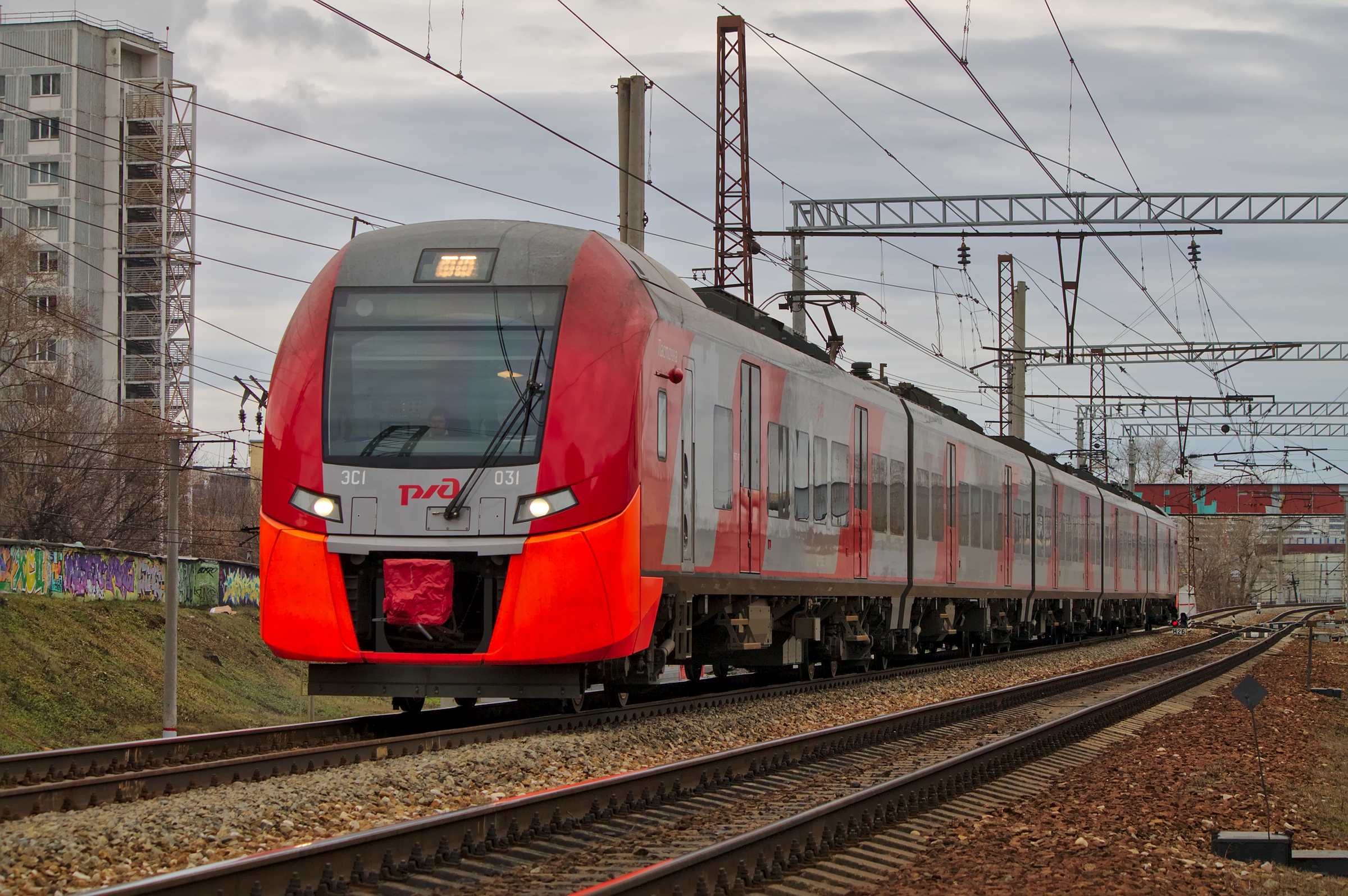 ЭС1-031, станция Москва-Рижская. см. фото 638225 в альбоме автора